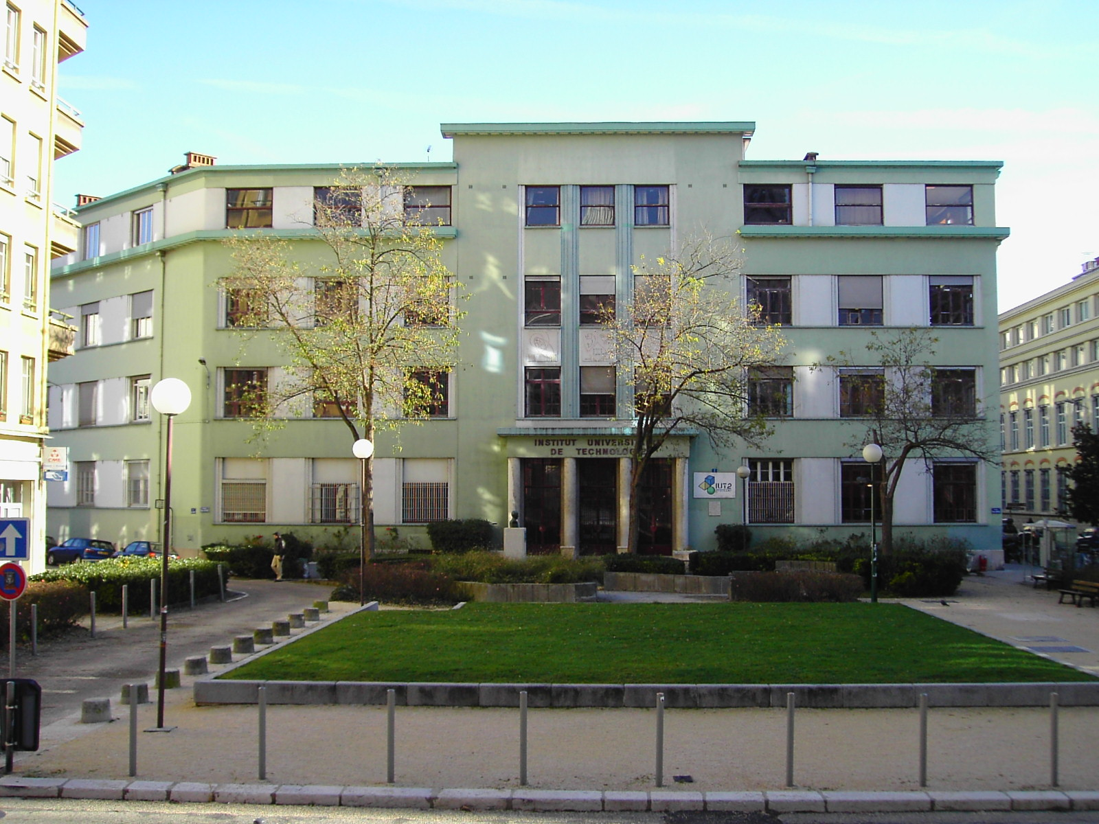 I.U.T. 2 sur la place Doyen Gosse à Grenoble